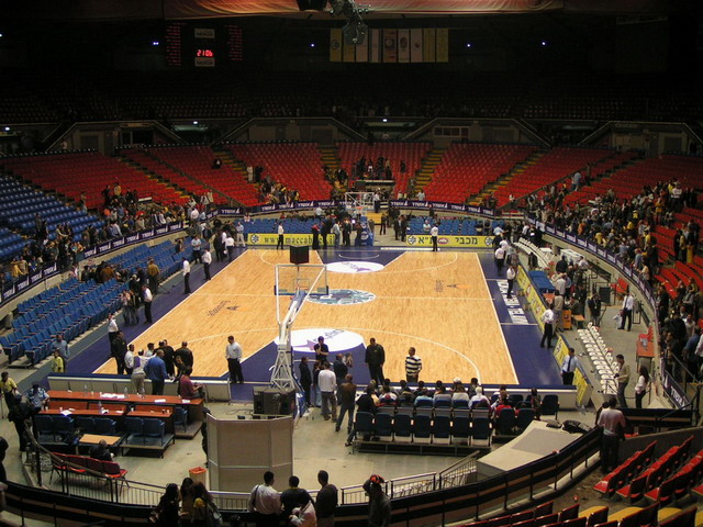 היכל נוקייה